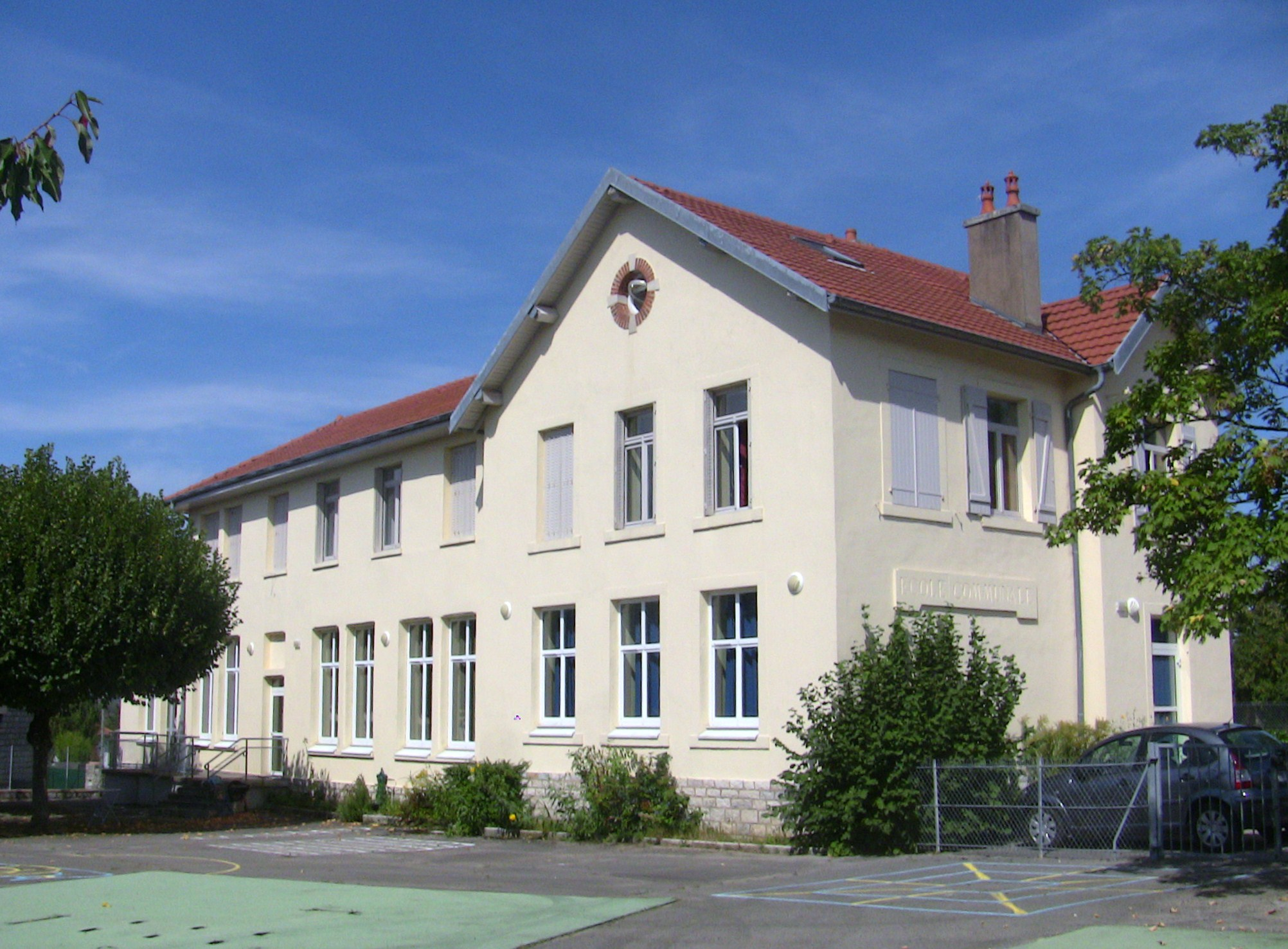 L'école maternelle de Bregille, à Besançon (Doubs, France).